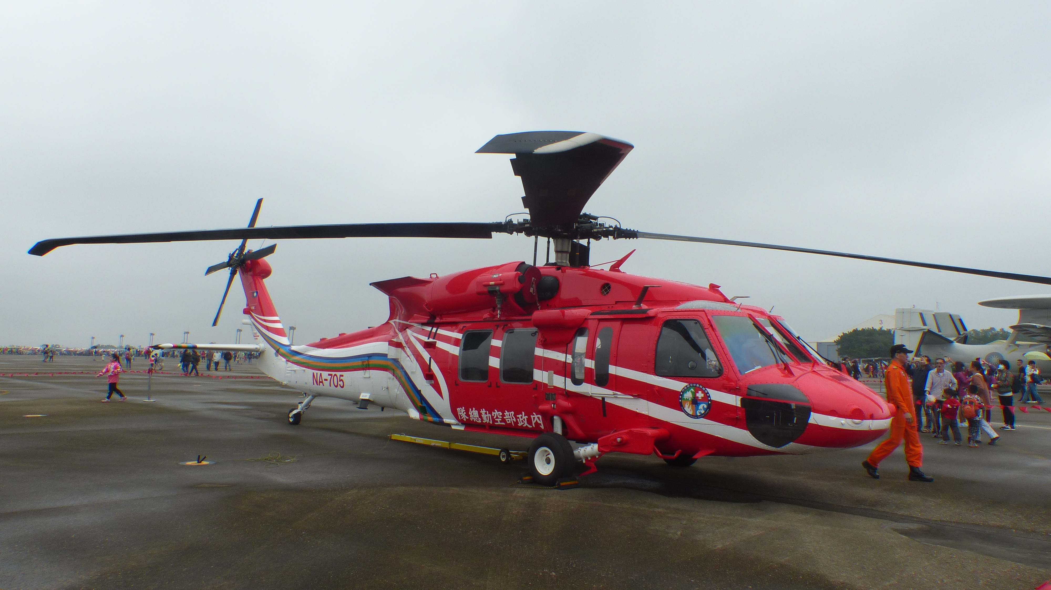 2016年空軍清泉崗基地營區開放活動下午，會場北部靜態展示的內政部空勤總隊UH-60M NA-108右前方。